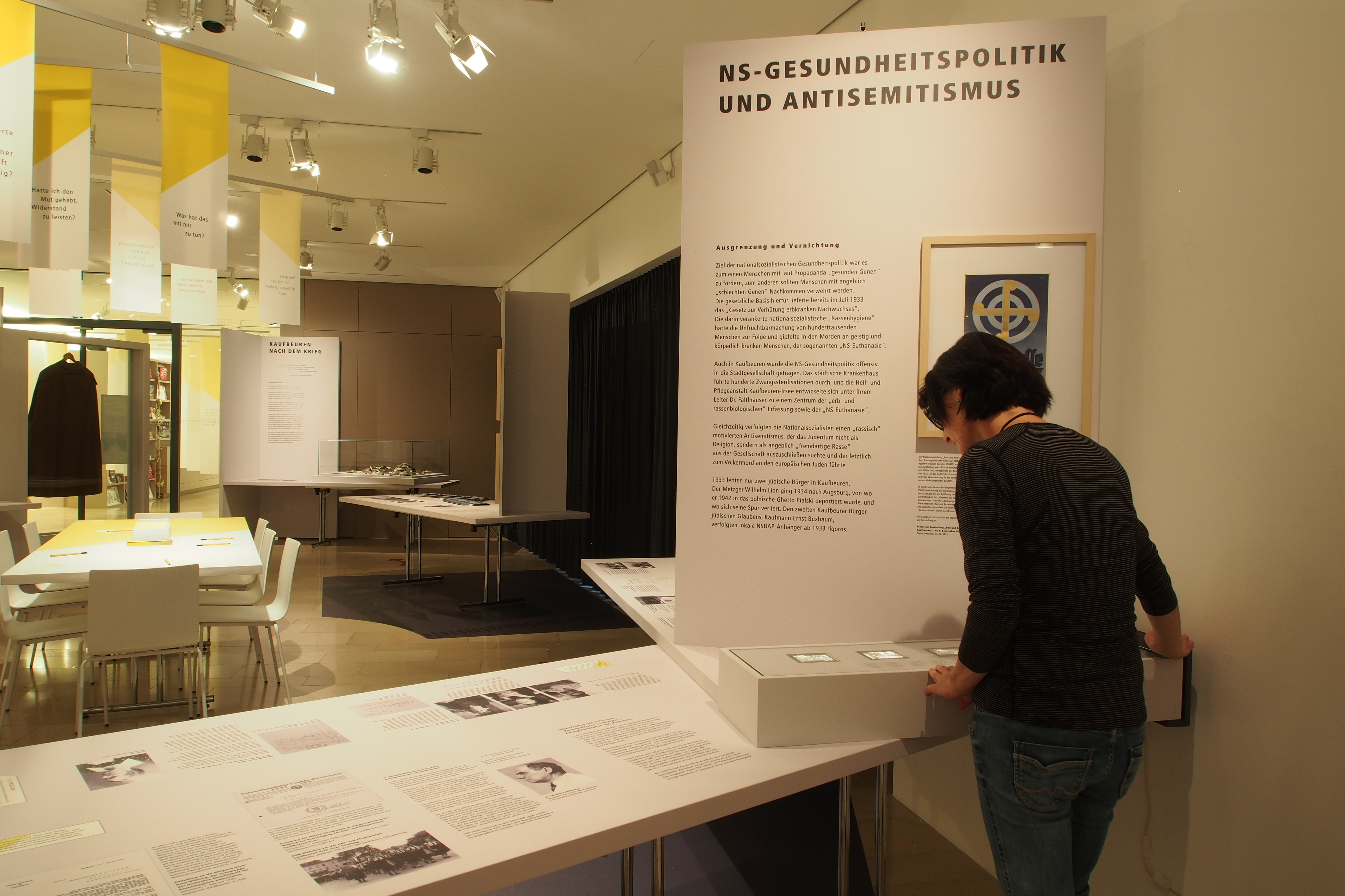 Blick in die Sonderausstellung "Kaufbeuren unterm Hakenkreuz. Eine Stadt geht auf Spurensuche", die von 1. November 2019 bis 23. August 2020 zu sehen war.